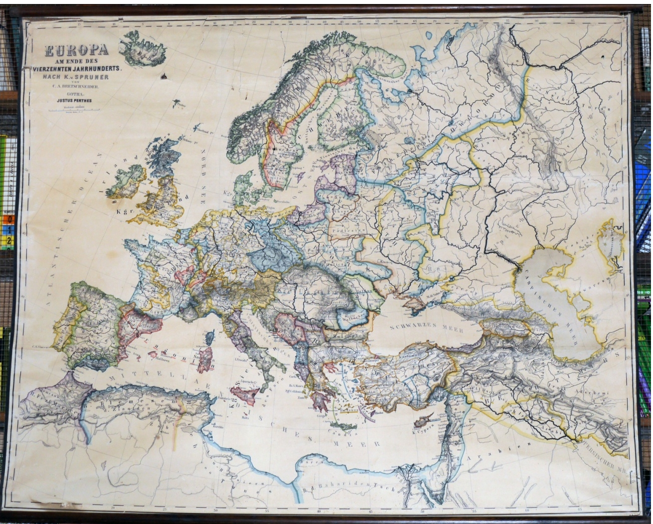 Escala: 1/ 400.000 - Medidas: 122 x 155 cm – Material: papel entelado. K. Spruner / Von C.A. Bretshneider 1930 Guardado con el nº 11 ( Armario 1, frontal ,izquierda)